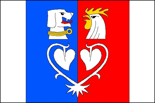 Vlajka obce Radošovice